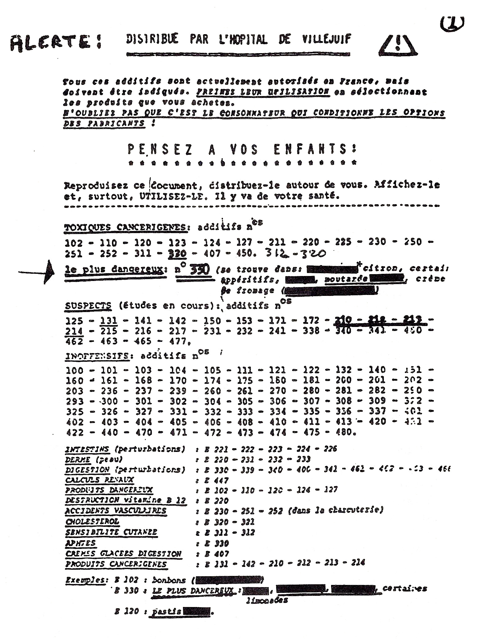 Version du "tract de Villejuif", une liste d'additifs alimentaires faussement présentés comme dangereux. Copie reproduite dans : Véronique Campion-Vincent et Jean-Bruno Renard, Légendes urbaines - rumeurs d'aujourd'hui, documents Payot, ISBN 2-228-88604-1 Les noms de marques ont été masqués par l'éditeur du livre.